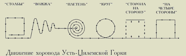 Сам хоровод, или как его называют в Усть-Цильме, «хождение под песню», радикально отличается от общепринятых представлений о хороводе. Он состоит из шести фигур, в строгой последовательности переходящих одна в другую, причем каждая из них выполняется под определенную песню, имеет свое имя и выполняется в определенном ритме.